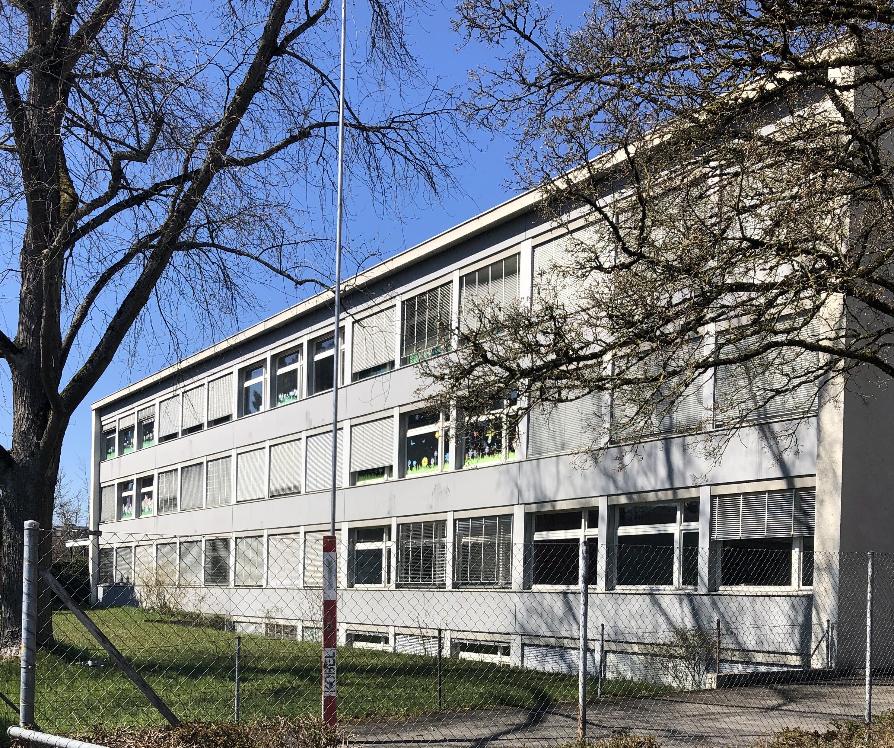 Bethlehemacker Schule